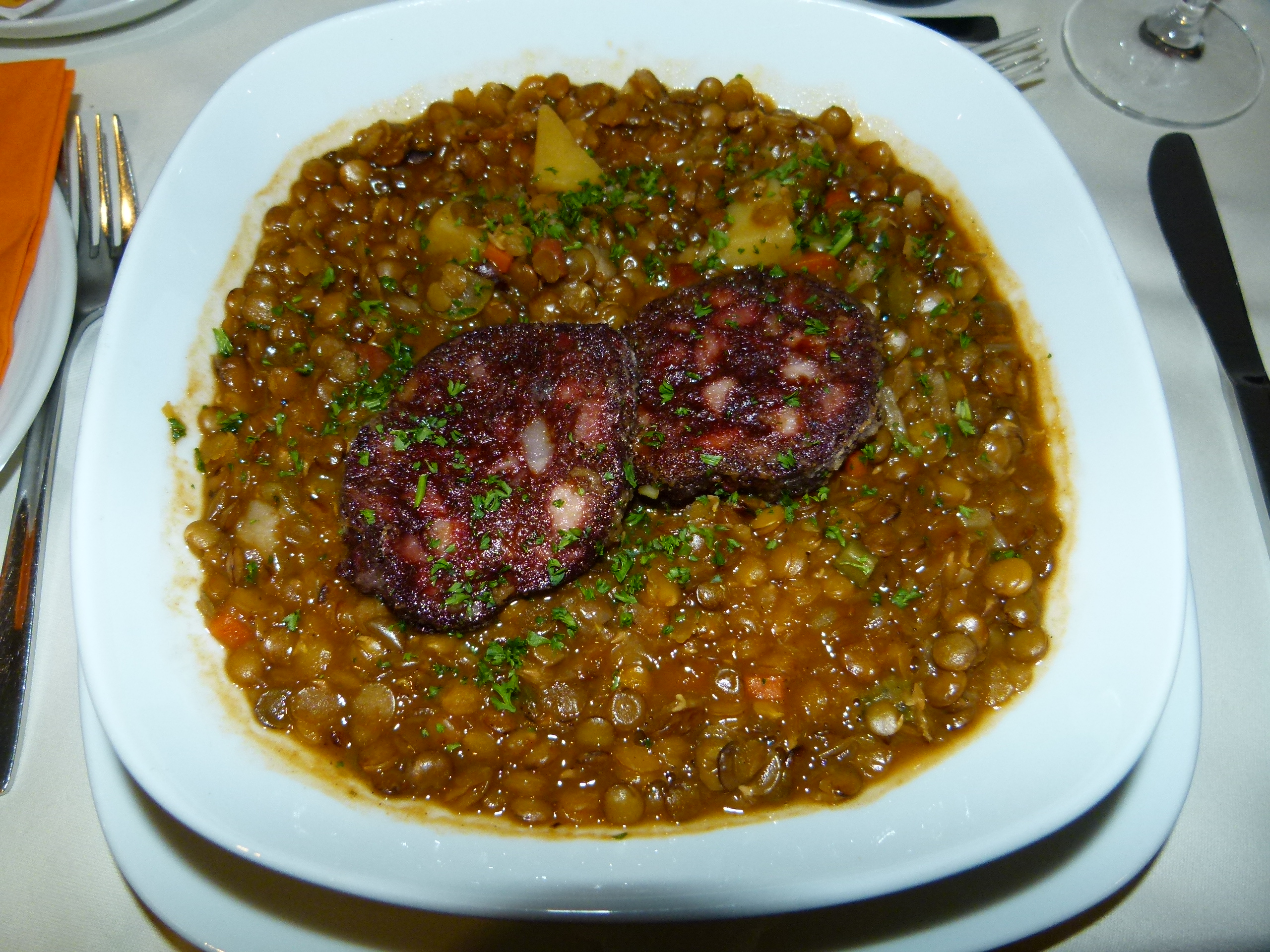 Linseneintopf mit Blutwurst, Waldhotel am Aschergraben, Geising